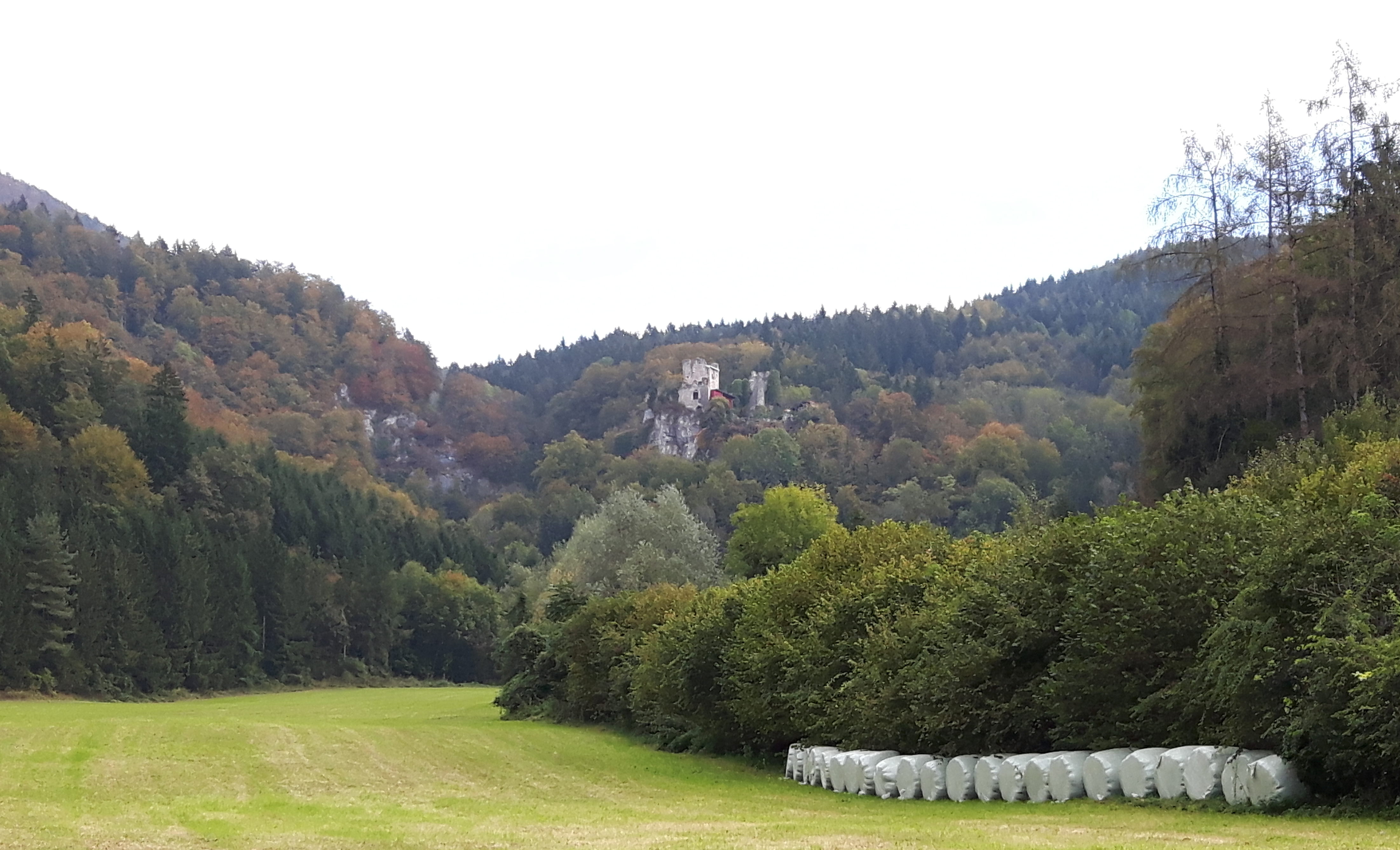 Burgruine Peggau